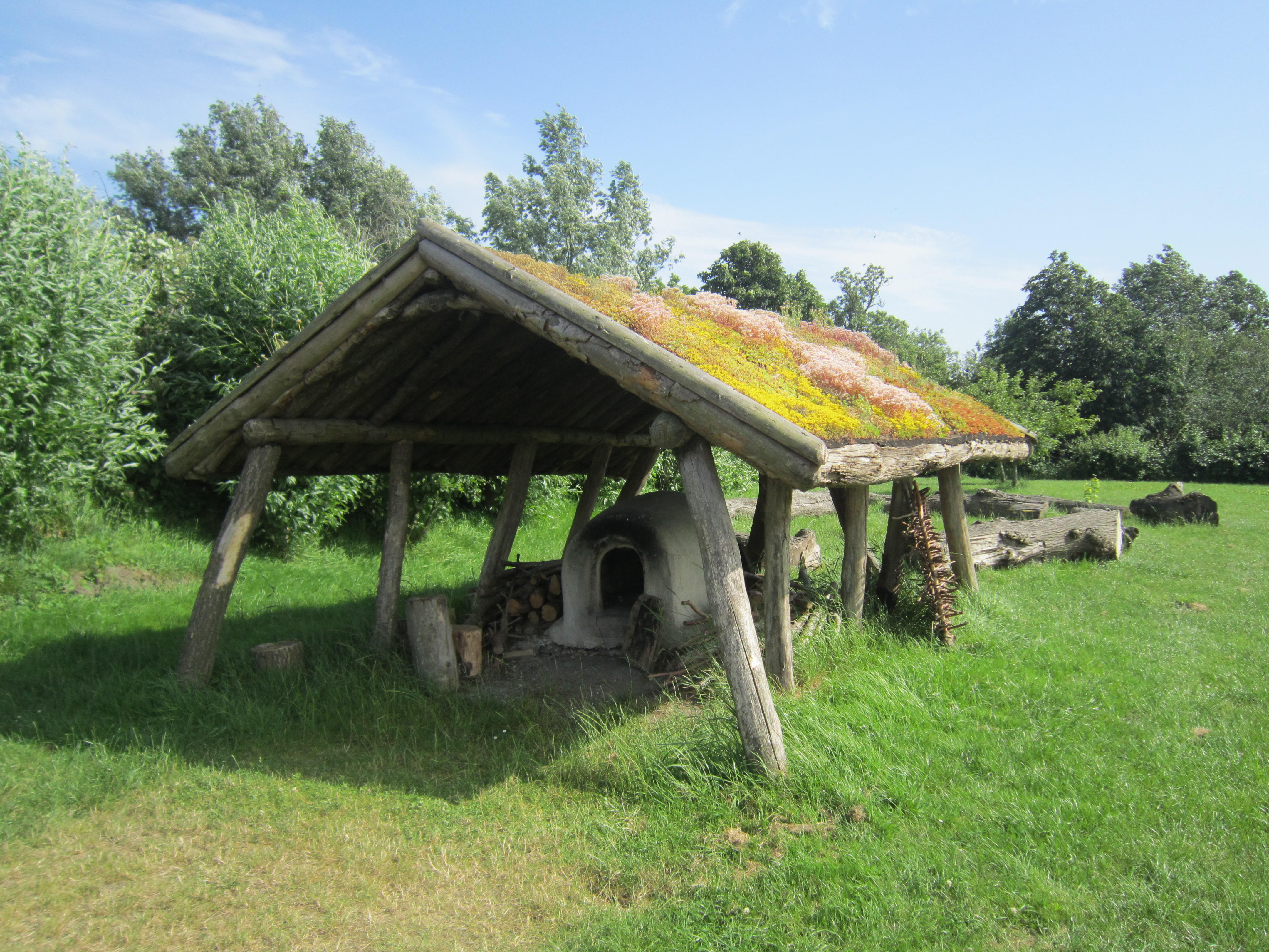 Zwischen dem Eingang und dem Bronzeithaus Hahnenknop, auch Bronzeithaus Hartwarderwurp genannt (Rodenkichen, Landkreis Wesermarsch in Niedersachsen) befindet sich ein überdachter Lehmbackofen, in dem an Aktionstagen Weizenschrotbrot gebacken wird.